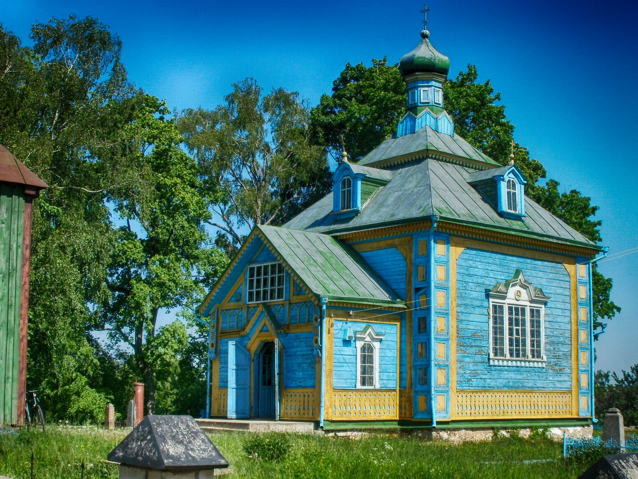 Беларуская (тарашкевіца): Сьвята-Крыжаўзьвіжанская царква. Гарадзішча This is a photo of Belarusian heritage monument. Reference number: 113Г000709 ( WLM)